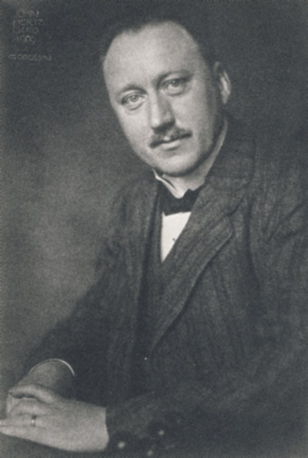 Fotografen John Hertzberg